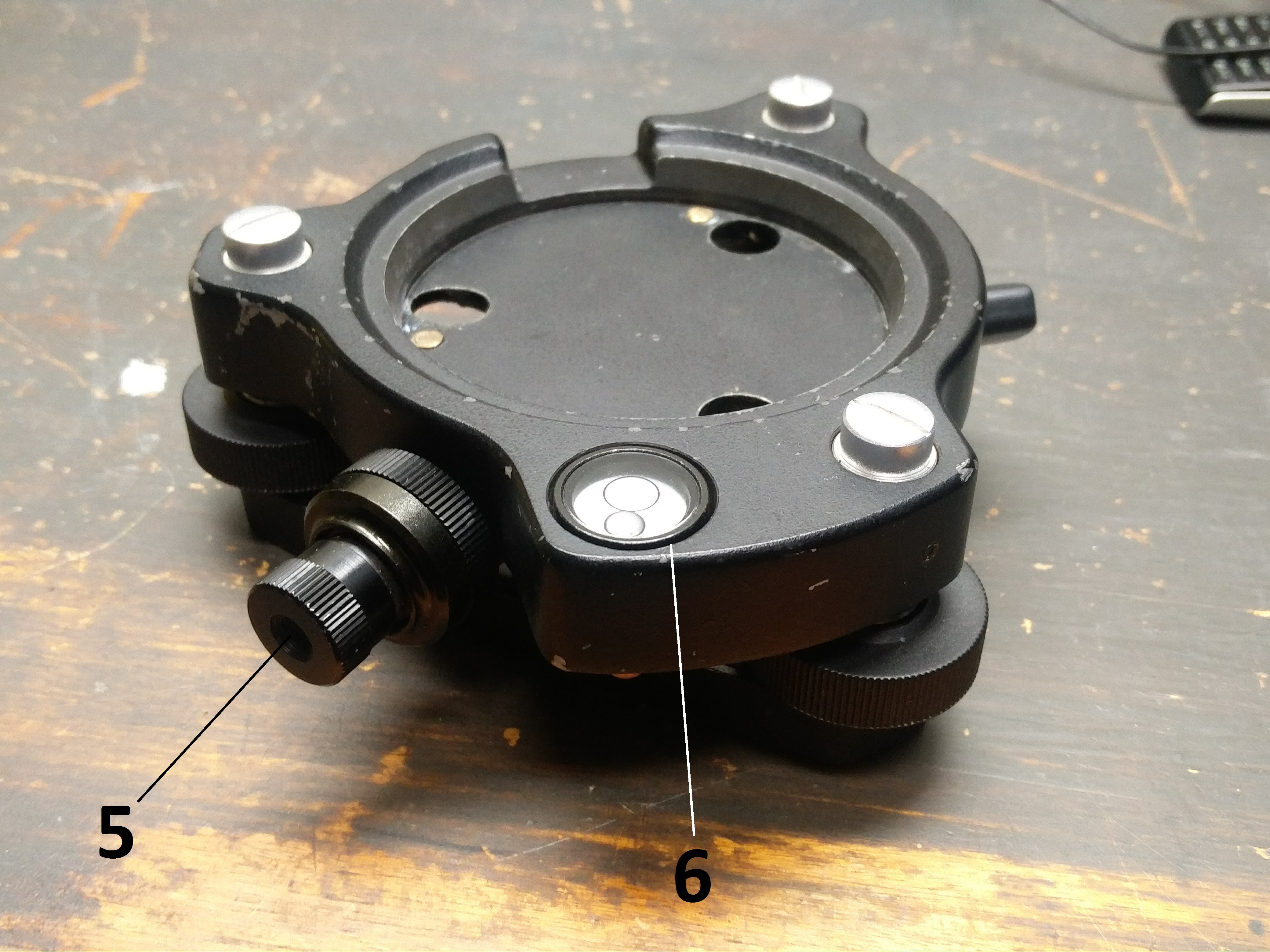 5. Optiline sihik 6. Vesilood